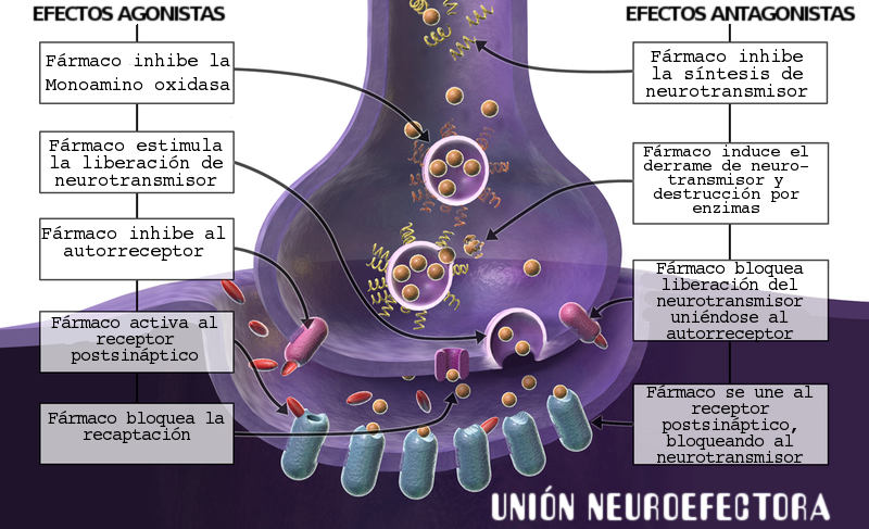 Ejemplos de agonismo y antagonismo en la unión sináptica